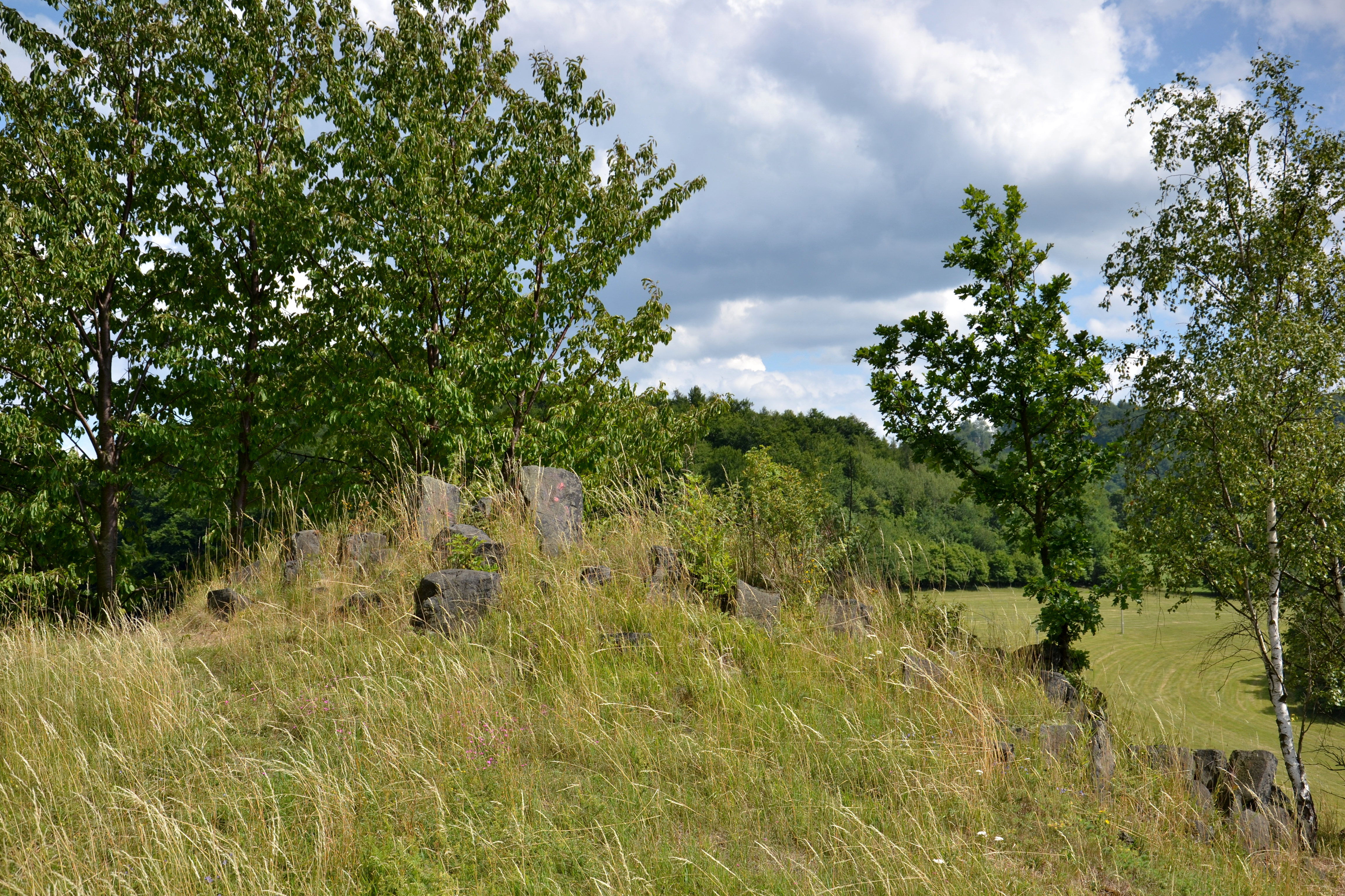 Pastviště u Okounova – vrchol Holého kopce